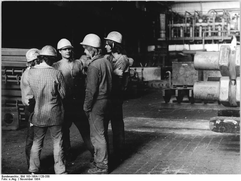 Schwermaschinenbau "Heinrich Rau" Wildau, Jugendbrigade ADN-ZB Zimmermann 19.12.1984 Stahlerzeugnisse werden vergütet -Beratung vor Schichtbeginn Die 26 Mitglieder der in drei Schichten arbeitenden Jugendbrigade "Völkerfreundschaft" des Betriebes Schwermaschinenbau "Heinrich Rau" Wildau (Bezirk Potsdam), sind im Werk durch ihre gessenhafte Arbeit bei der Vergütung von Stahlerzeugnissen gut bekannt. Für ihre Qualitätsarbeit erhielten sie hohe staatliche Auszeichnungen, u.a. den Orden "Banner der Arbeit" Stufe 3. Brigadier Hartmut Tornow (Mitte) leitet eines der drei Schichtkollektive, er wird durch seine Vorbildwirkung geachtet. Mit dreizehn weiteren Betrieben des Landes gehören die Wildauer zum Schwermaschinenbau-Kombinat "Ernst Thälmann" Magdeburg. Im Kombinat sind 26.000 Werktätige beschäftigt. Rund 3 500 von ihnen arbeiten im Wildauer Betrieb, dem zweitgrößten des Kombinates. Es ist ein Spezialbetrieb u.a. für Walzwerkausrüstungen, Schiffskurbelwellen und Wälzlagerringe. Hier befindet sich auch eine Gesenkschmiede, die zu den größten Europas zählt. Nach dem 2. Weltkrieg nahm der Wildauer Betrieb im Jahre 1949 mit 400 Arbeitern die Produktion wieder auf. Es wurden Eisenbahn-Waggons repariert und Haldenpflüge hergestellt. Bereits 1953/54 begann die Fertigung von Kurbelwellen, die heute in mehreren Ausführungen im Programm sind.